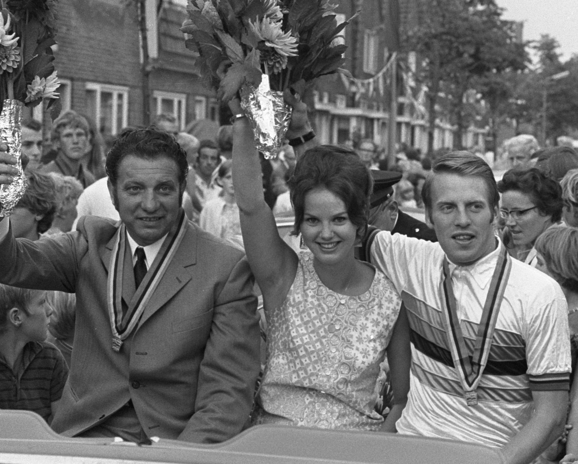 Wielrenner Cees Stam (rechts) wordt gehuldigd in Koog aan de Zaan; gangmaker Joop Stakenburg (links) en Stam en echtgenote Stam in auto in het dorp